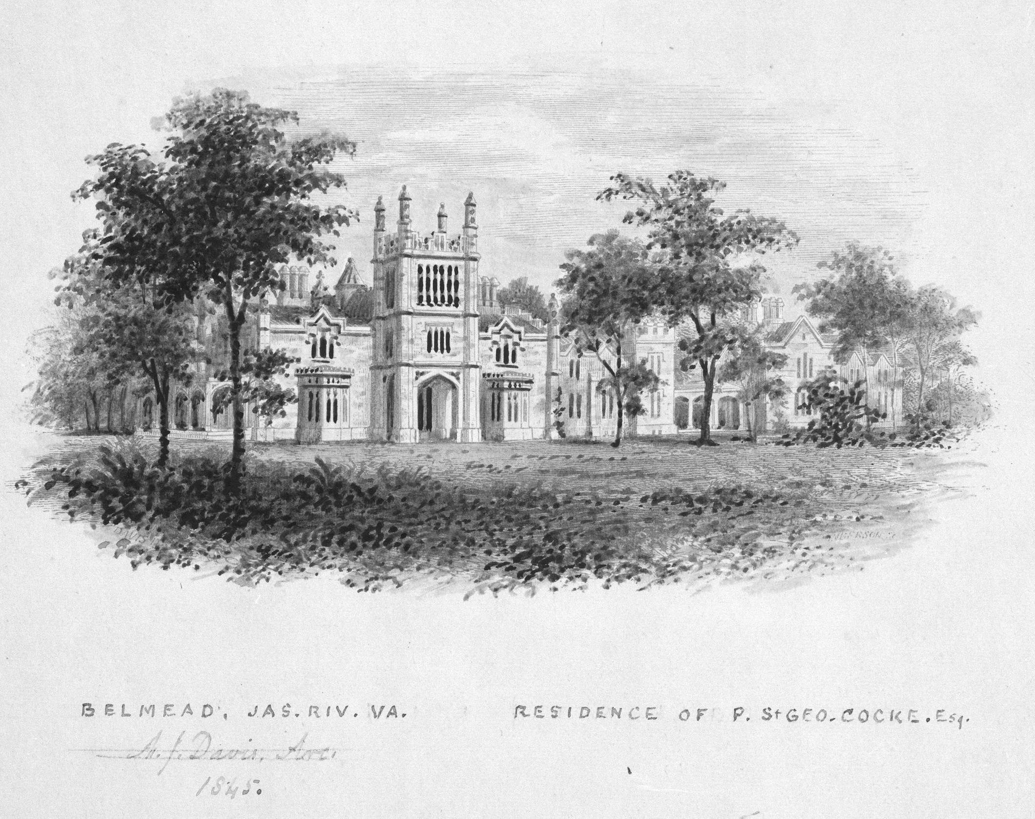 Drawing; Drawings